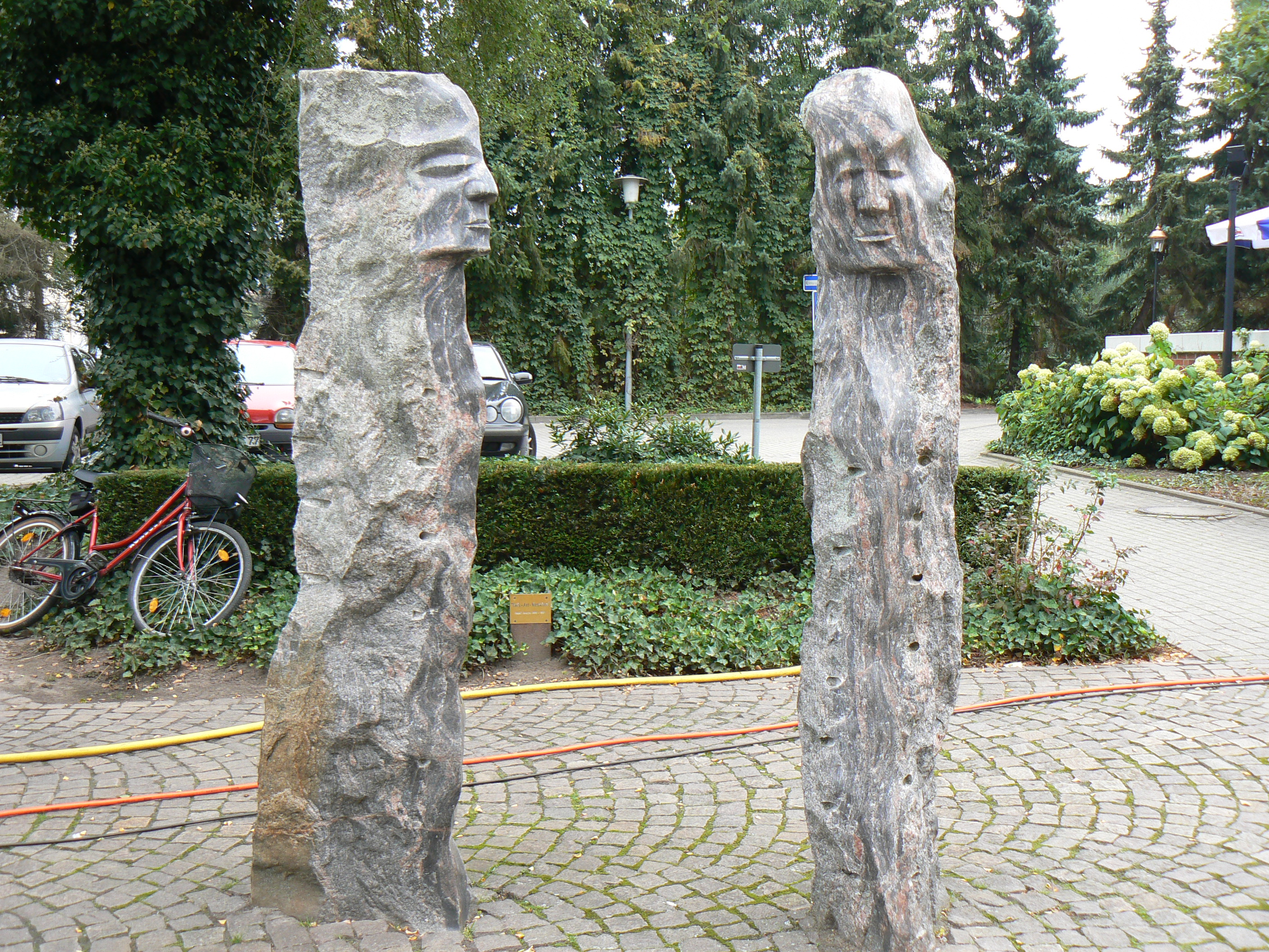 Sculpture Park-Art-Menschen 1993-1997 by Eckart Grenzer in Damme/Germany